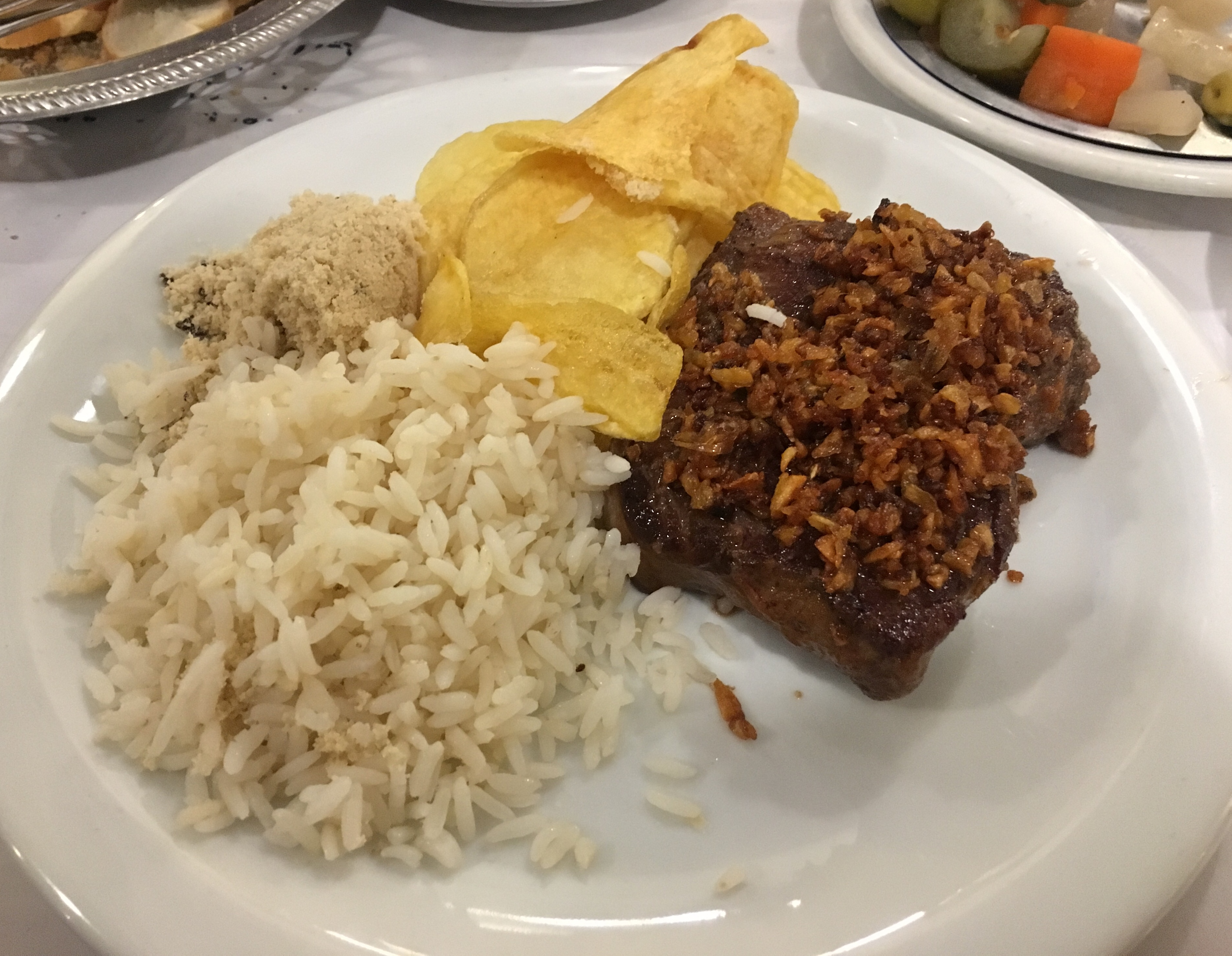 Filé à Osvaldo Aranha , prato típico carioca, consiste de um bife de contra-filé com cobertura de alho frito, acompanhado de arroz branco, batatas portuguesas e farofa de ovos.